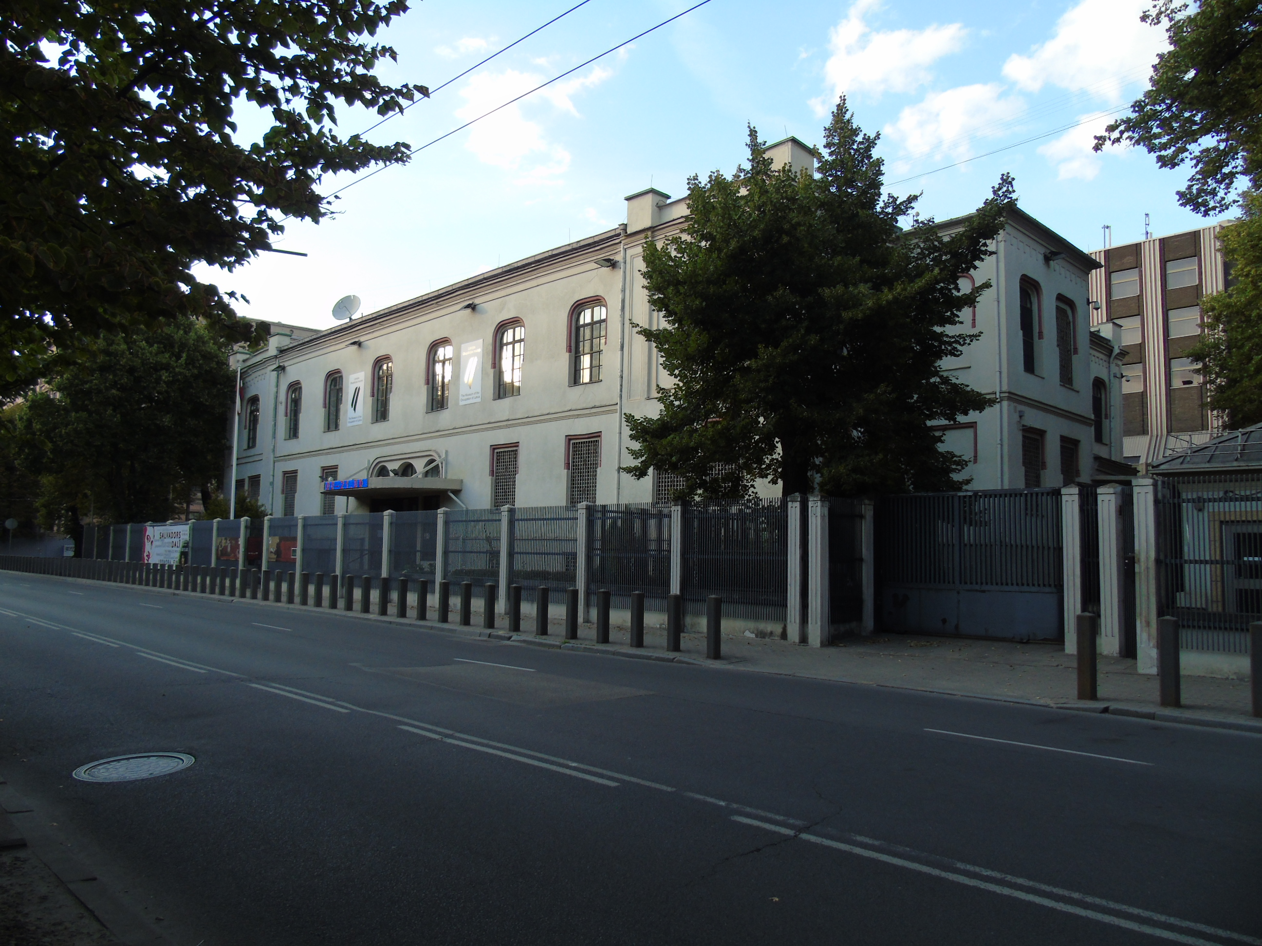 Administratīvā ēka, Rīga, Raiņa bulvāris 7